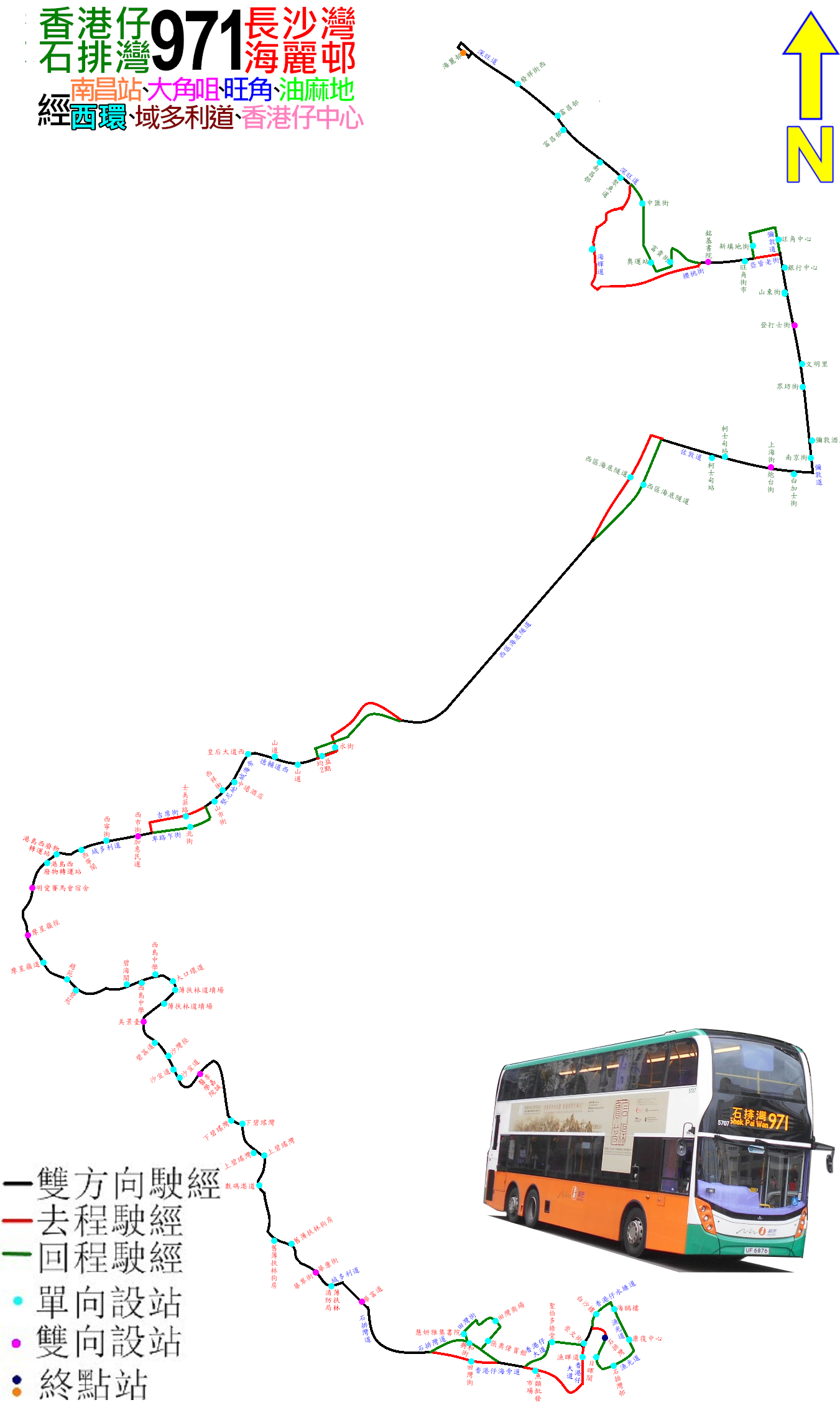 中文（香港）: 過海隧巴971線的走線圖